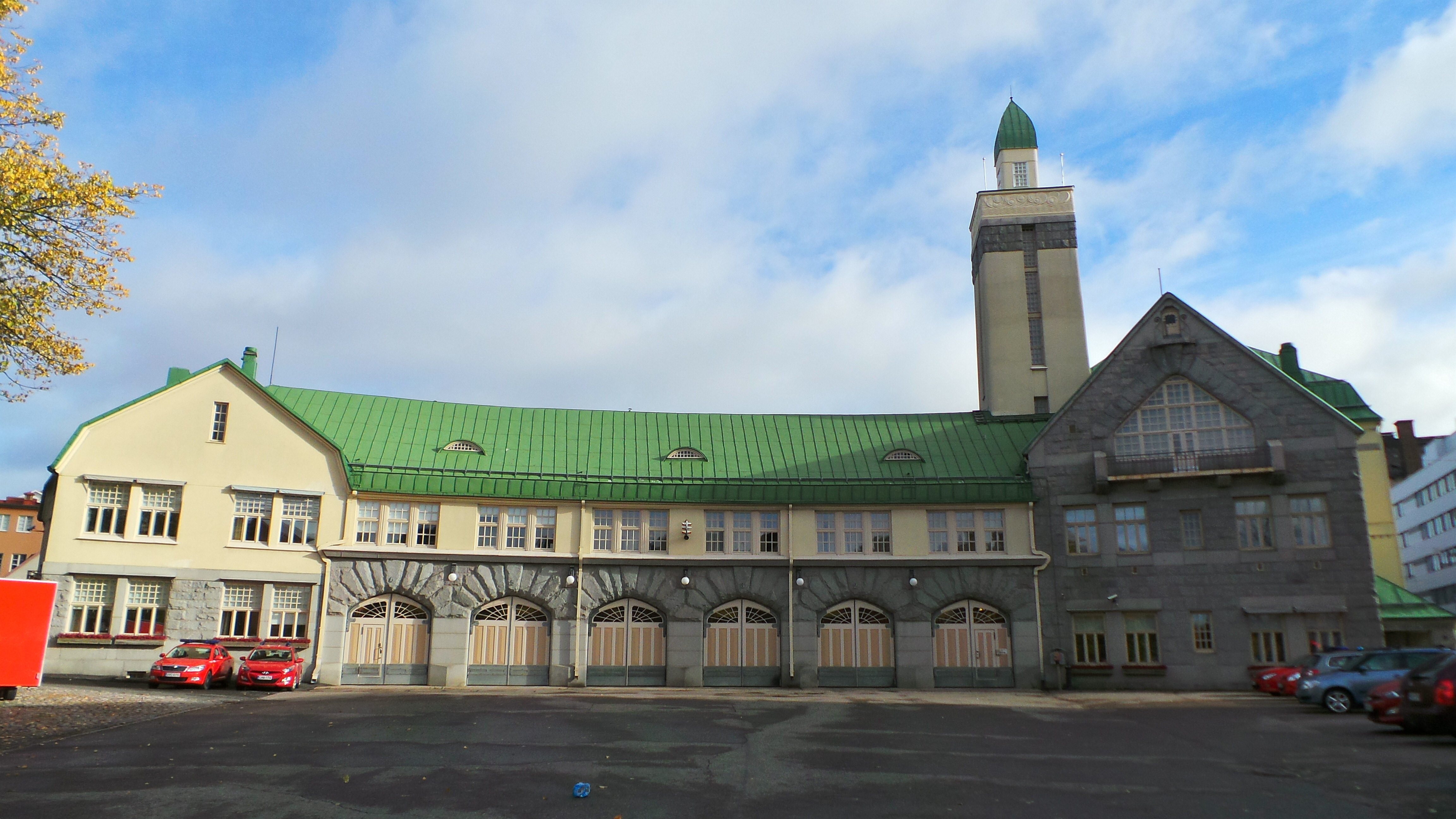 Tampere Paloasema 10